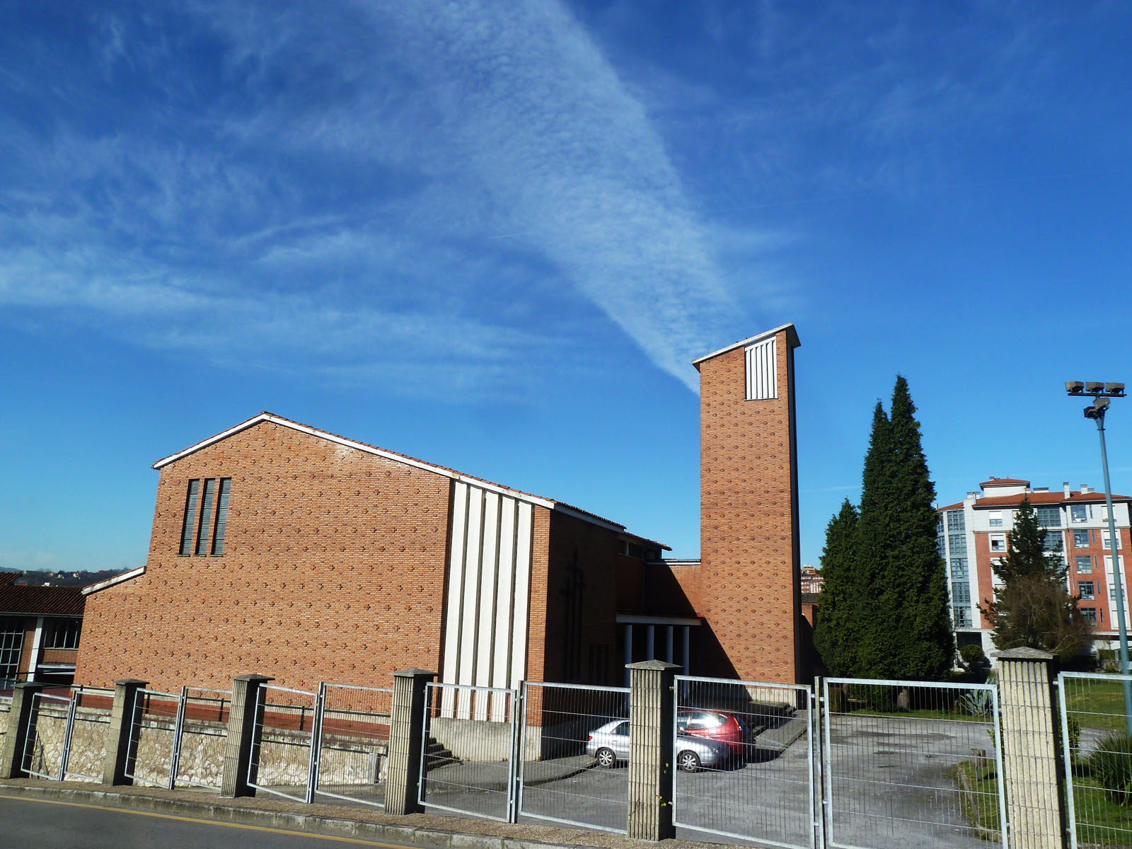 Iglesia Iglesia, Fundación Masaveu, Oviedo.